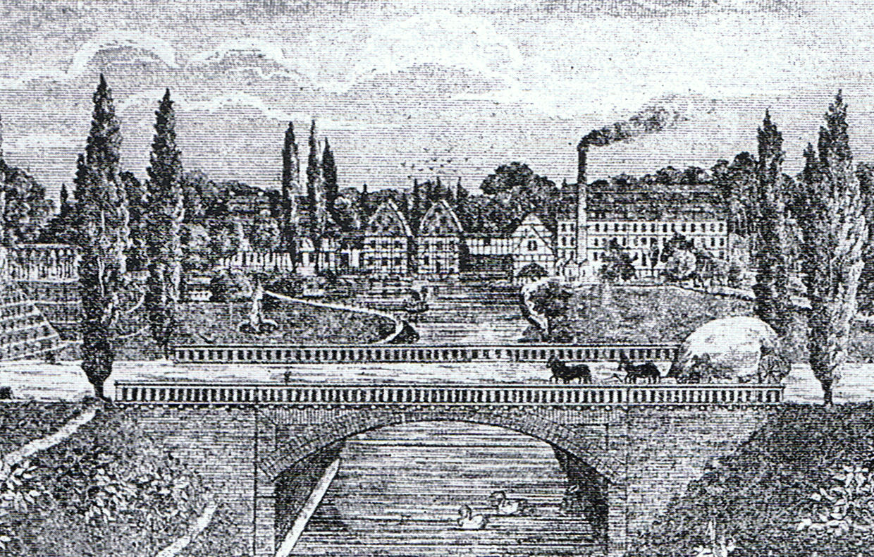 Papiernia w Szczecinie Strudze (widok z 1840 r.)